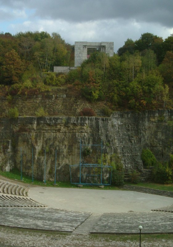 Das Freilufttheater (Feierstätte der Schlesier) von 1938 auf dem Annaberg in Oberschlesien und Denkmal zur Erinnerung an schlesischen Aufstände